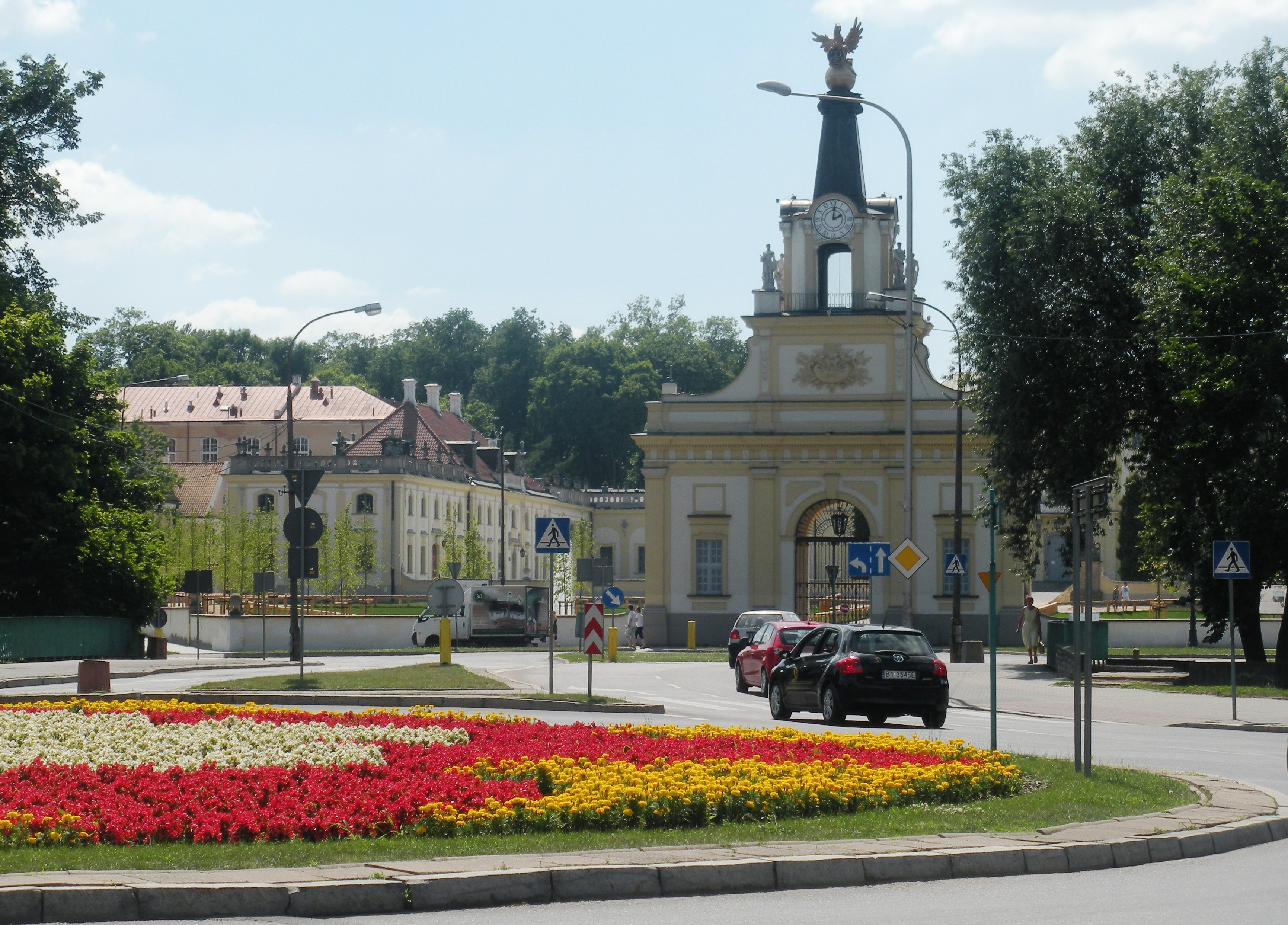 Brama pałacu Branickich i rondo Lussy w Białymstoku